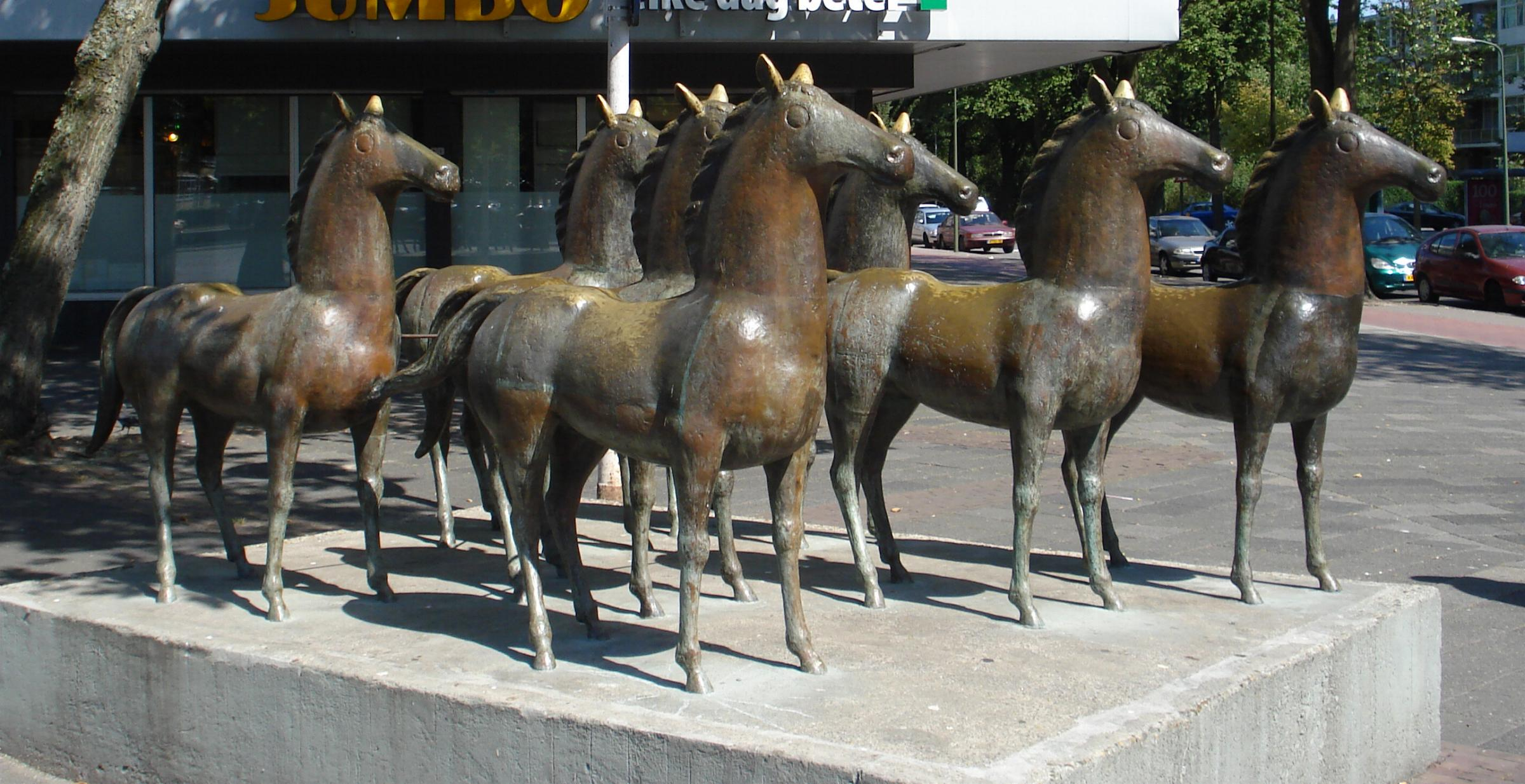 Den Haag, De Stede. Kunstwerk "Groep van zeven paarden" van Kees de Kruijff. The Hague/The Netherlands.